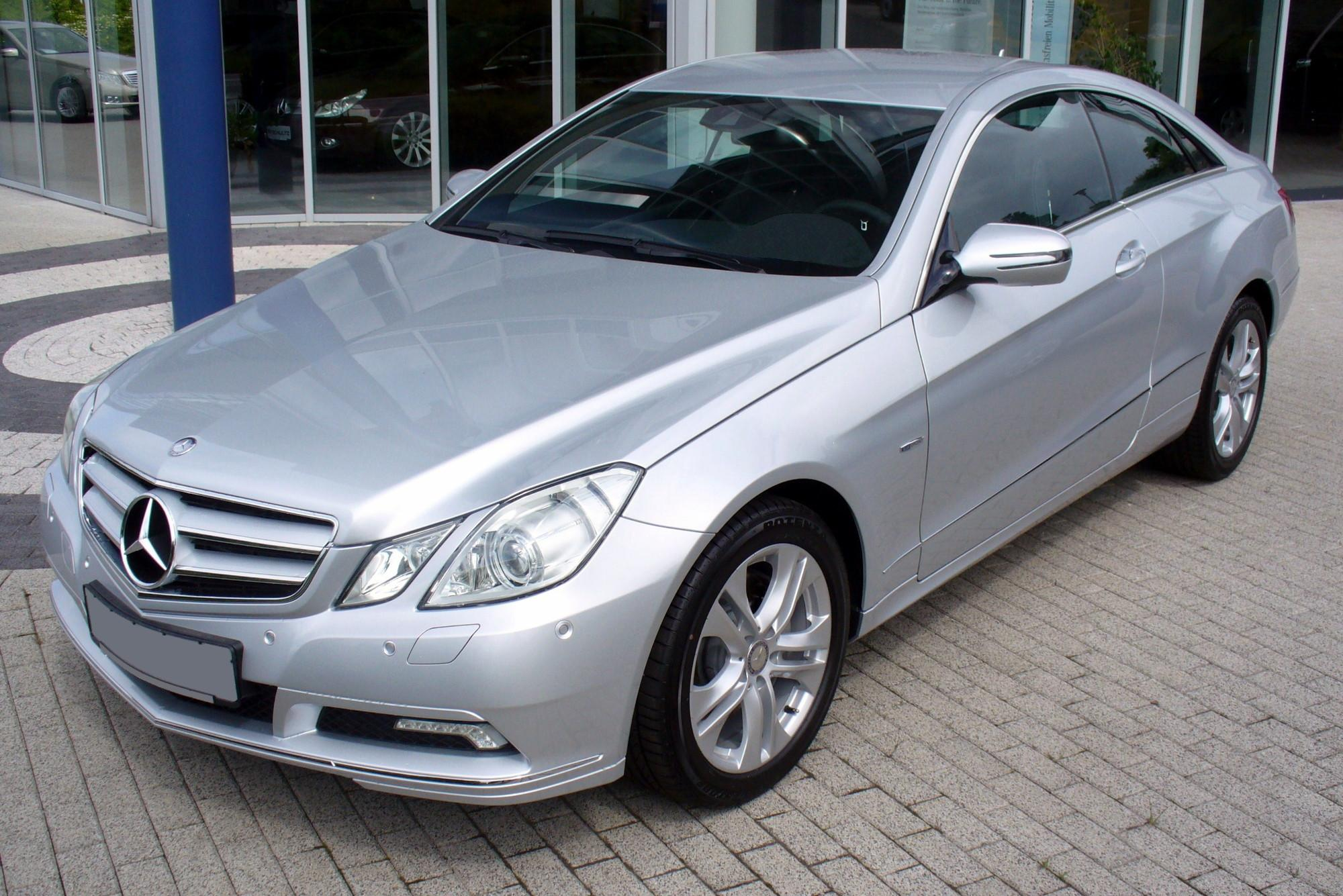 Mercedes-Benz C207 E 350 CDI